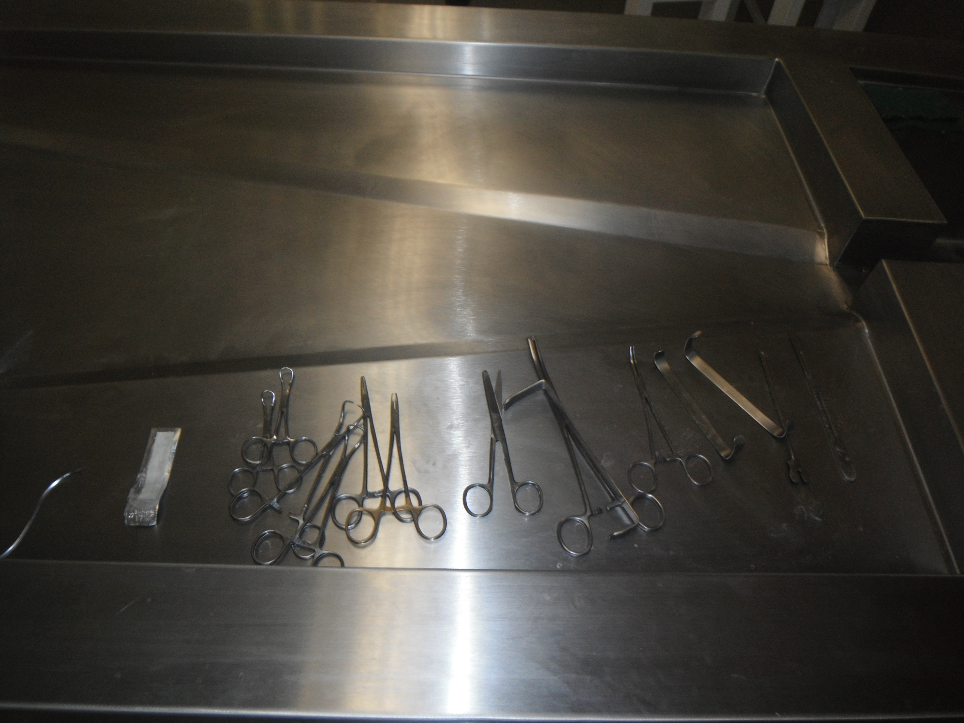 utencilios para embalsamar